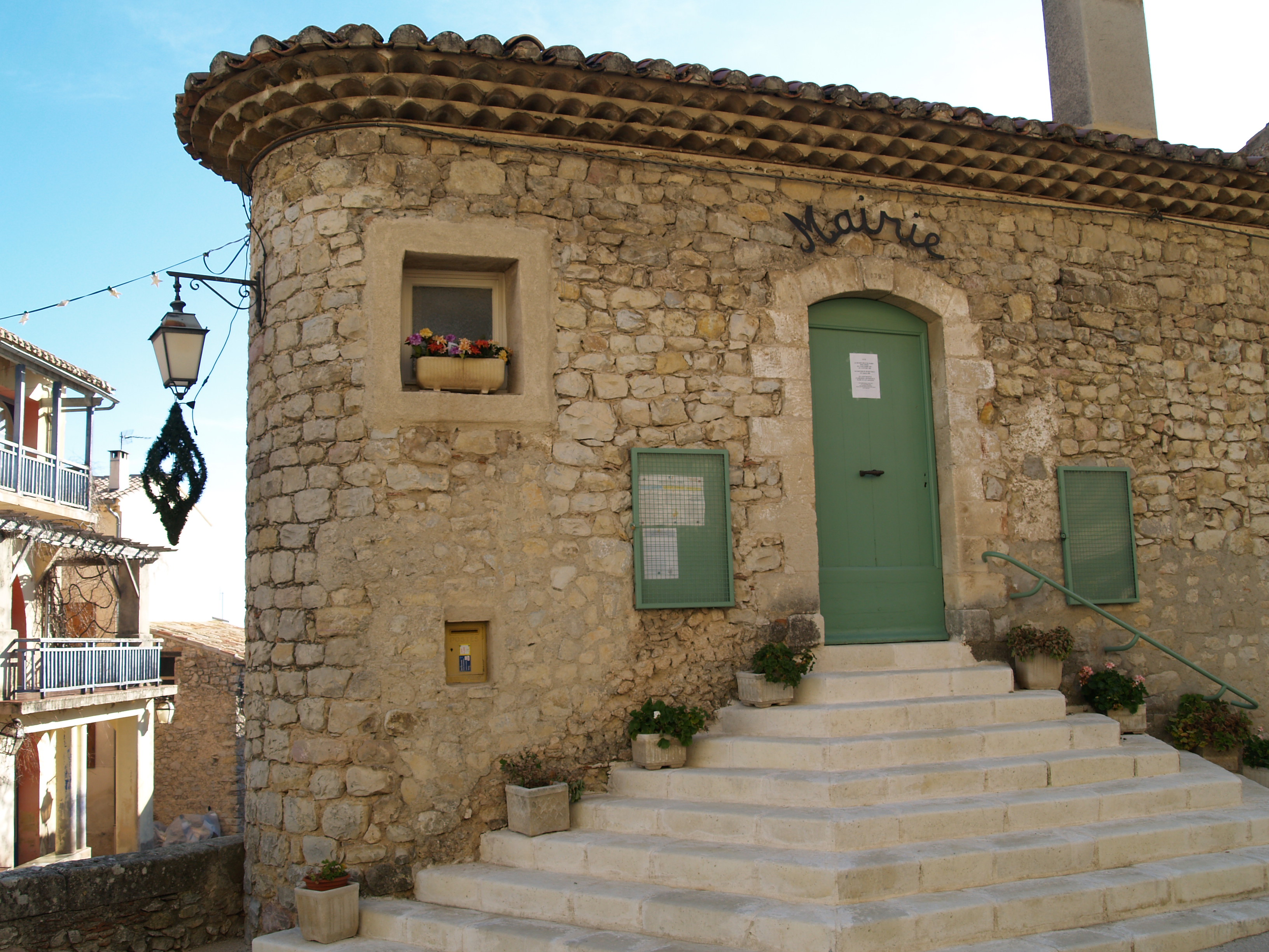 L'entrée de la mairie de Vitrolles en Luberon